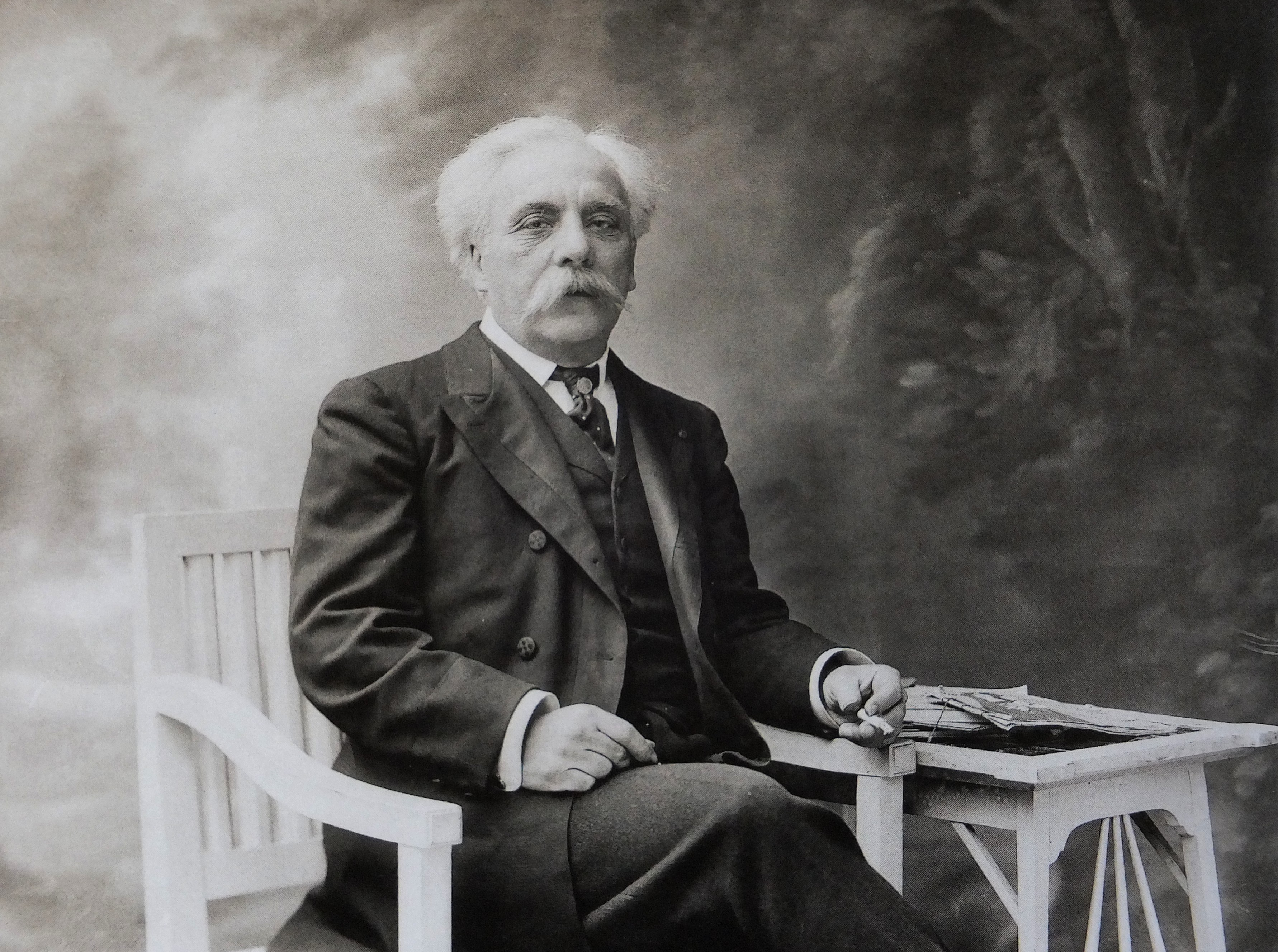 Gabriel Fauré, photographié par Paul Nadar le 29 novembre 1905.